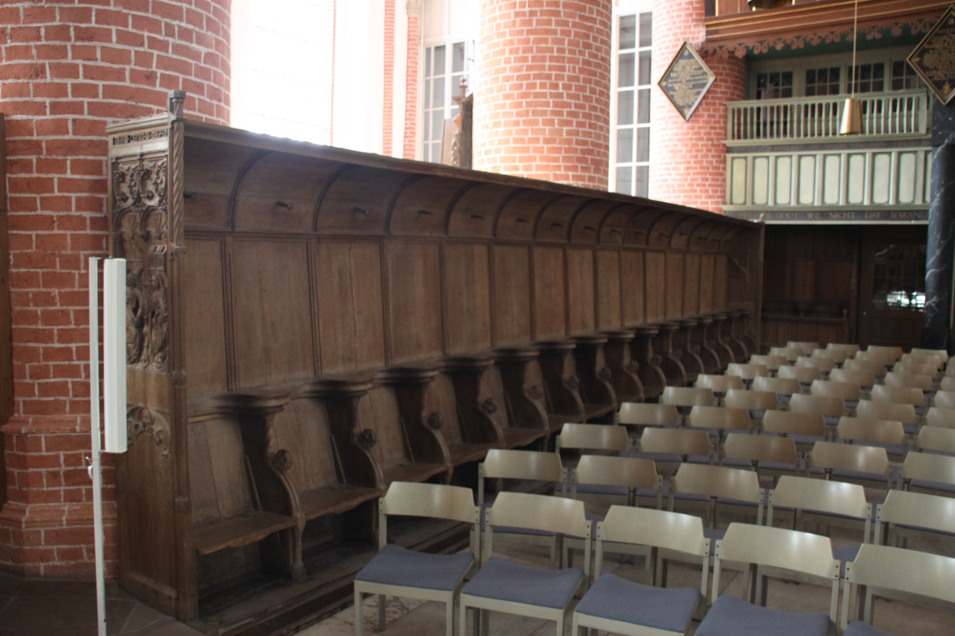 Gestühl Ludgerikirche